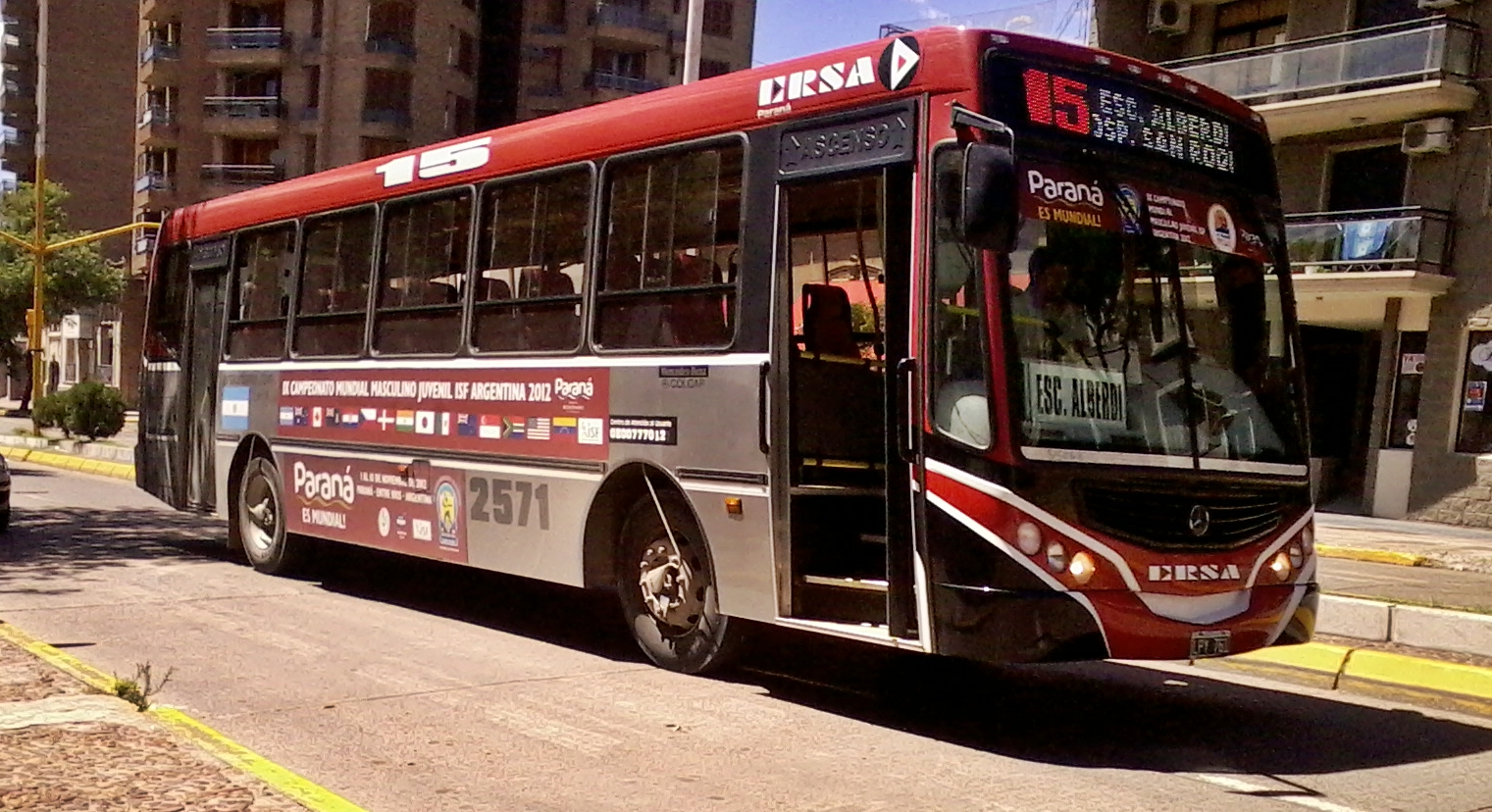 Coche 2571 de la línea 15 de Paraná. ColectivosEntreRios.